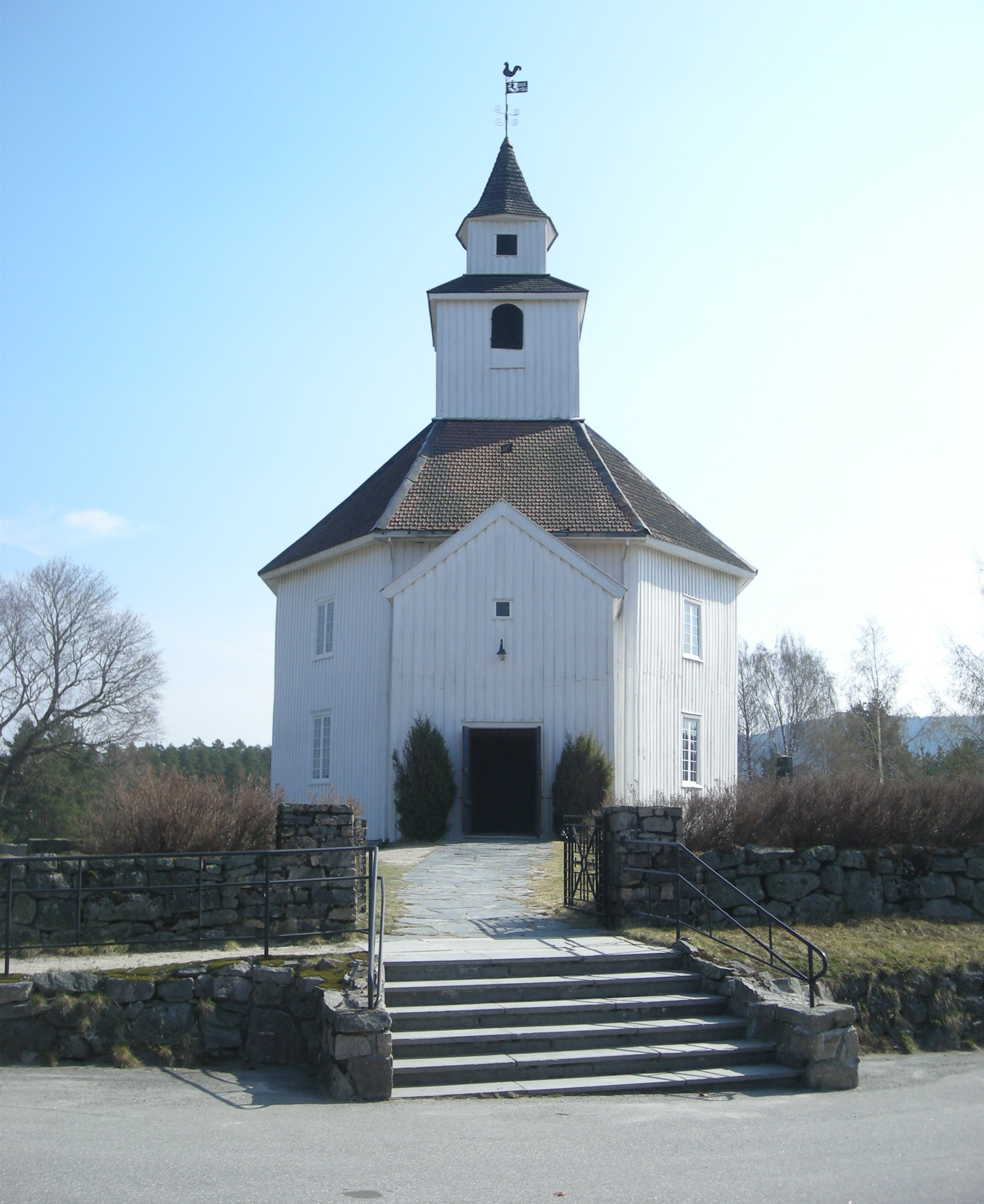 Fylkesvei 310 vest for Hornnes kirke i Setesdalen